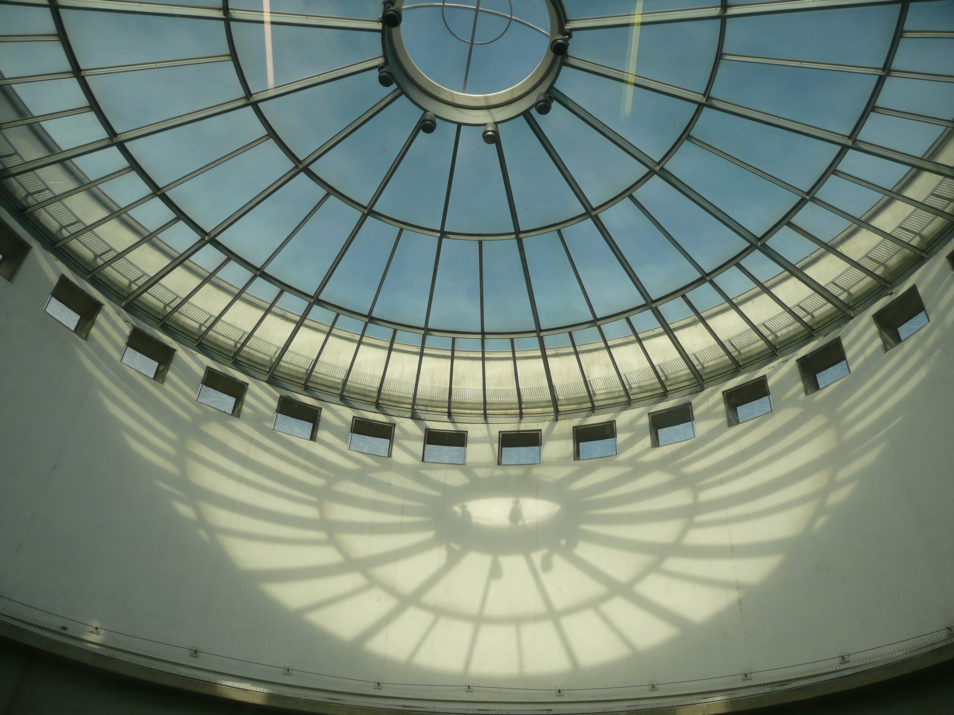 Schirn Kunsthalle in Frankfurt am Main, dome